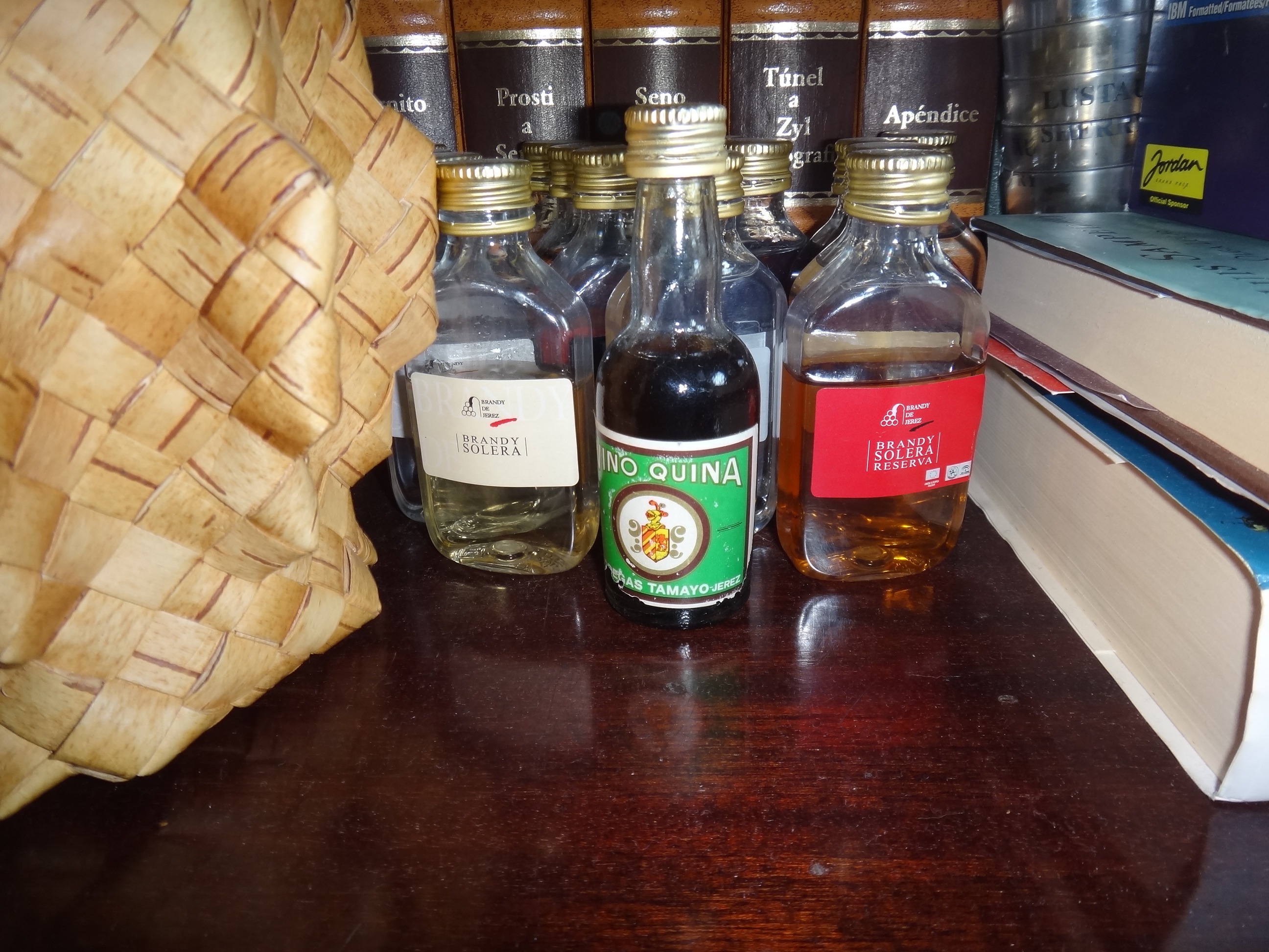 Vino Quina de Jerez y Brandies de Jerez